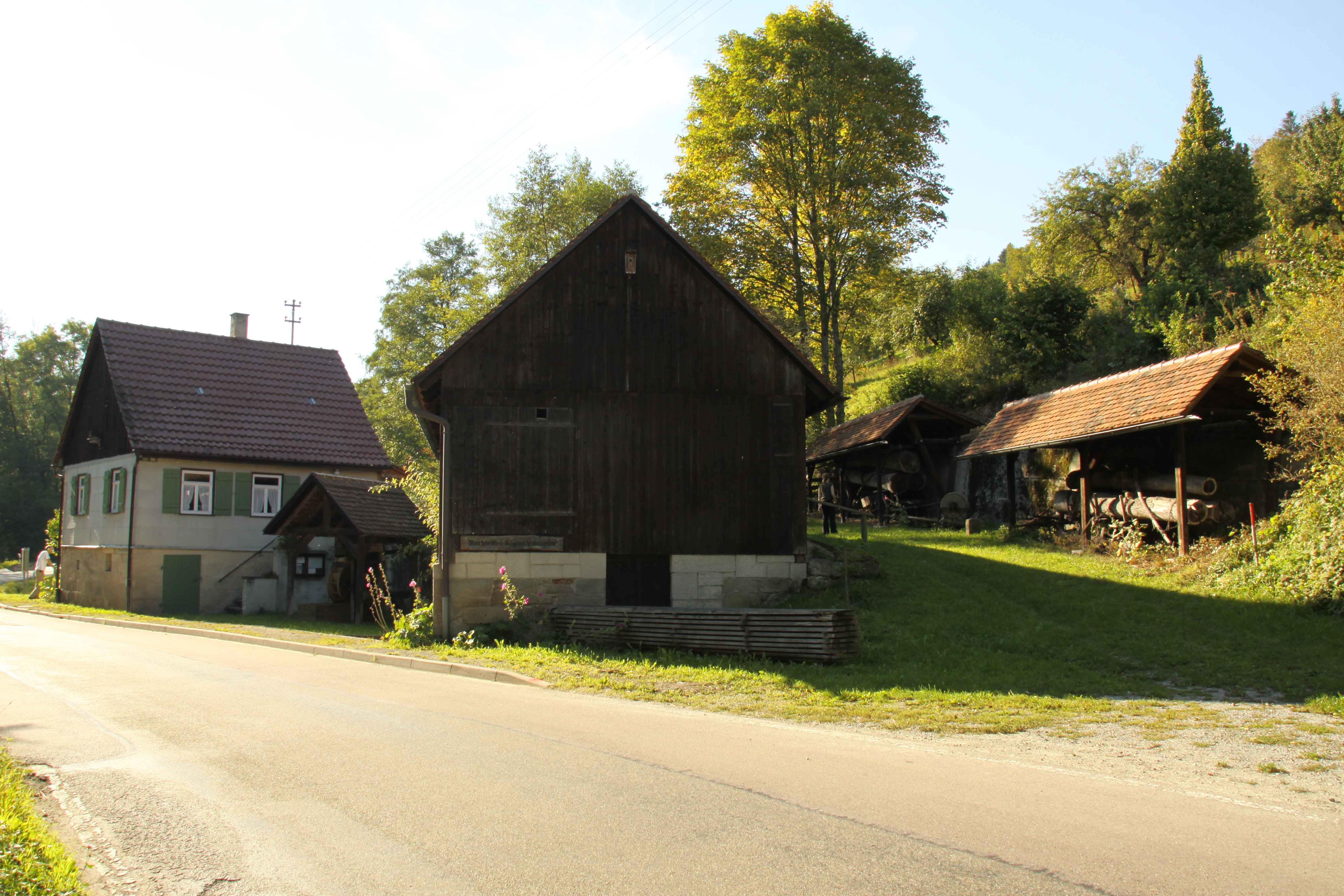 Saegewerksmuseum